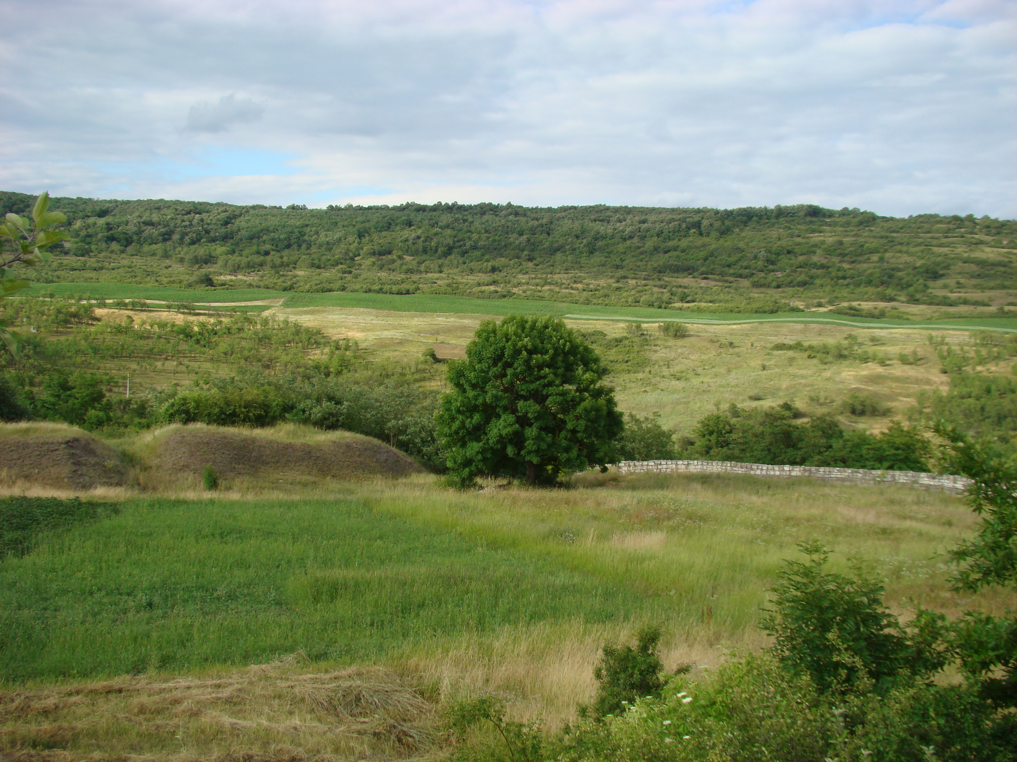 Ansamblul fortificat Dăbâca, sat Dăbâca; comuna Dăbâca, județul Cluj